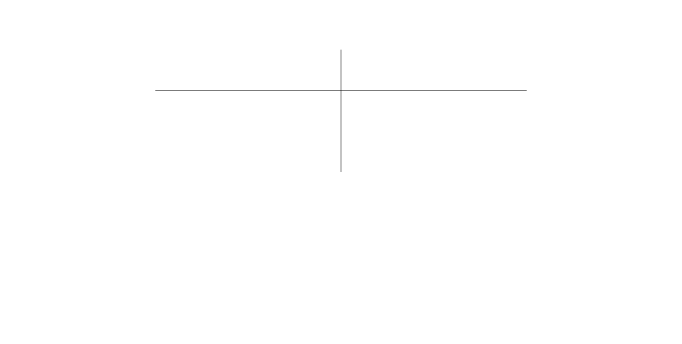 etape5